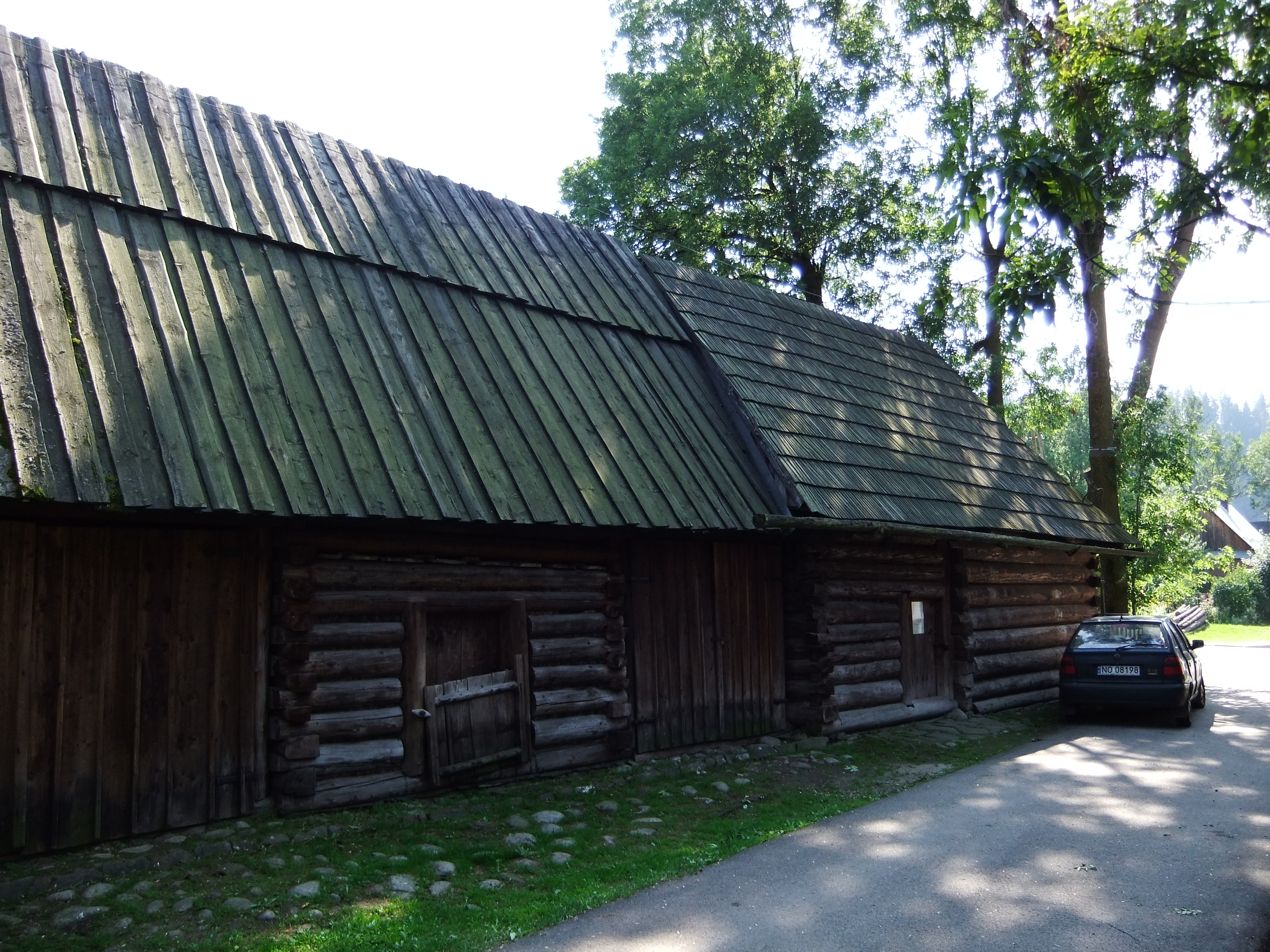 Zagroda Soltysów w Jurgowie